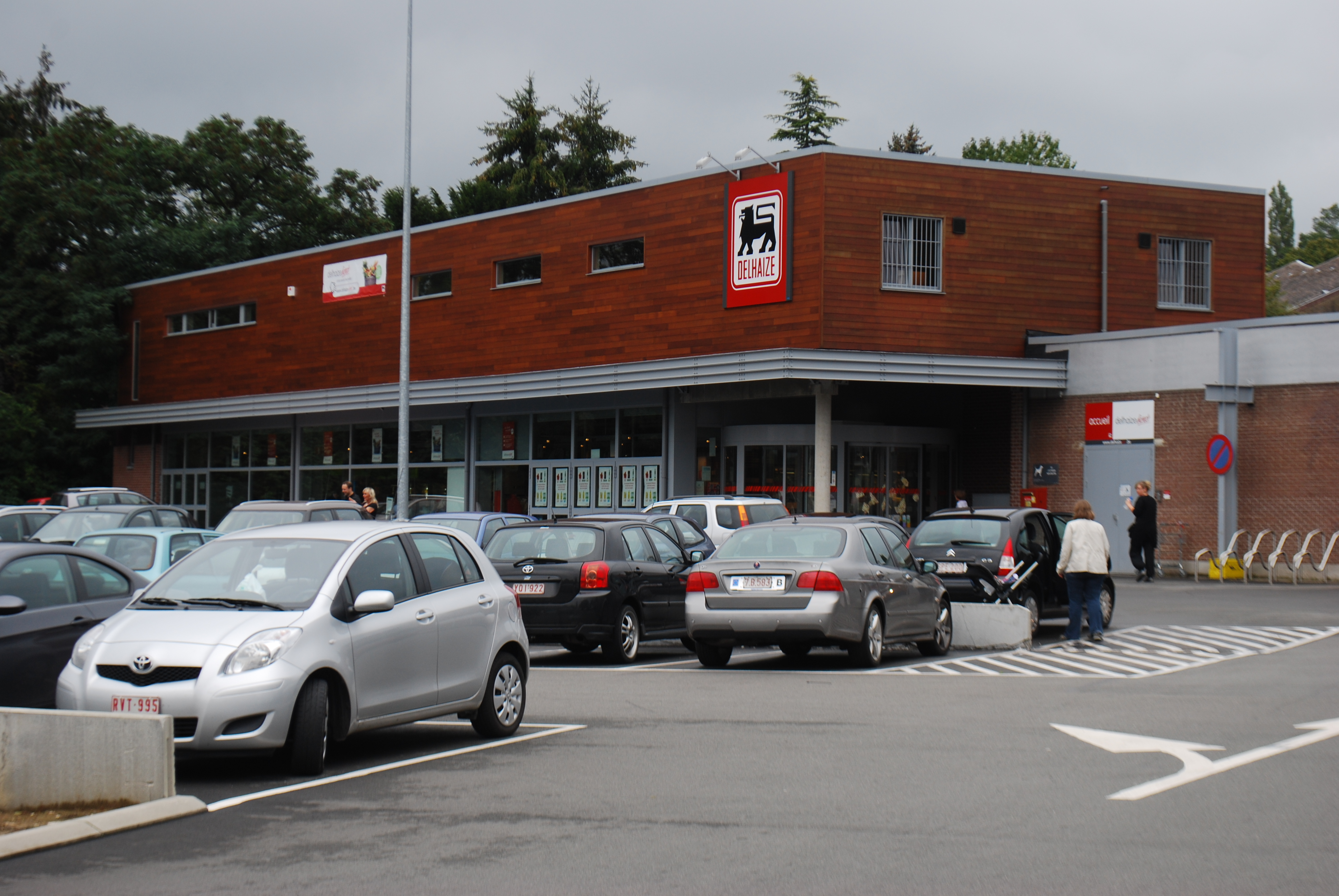 Vue du parking du supermarché Delhaize, à Embourg.